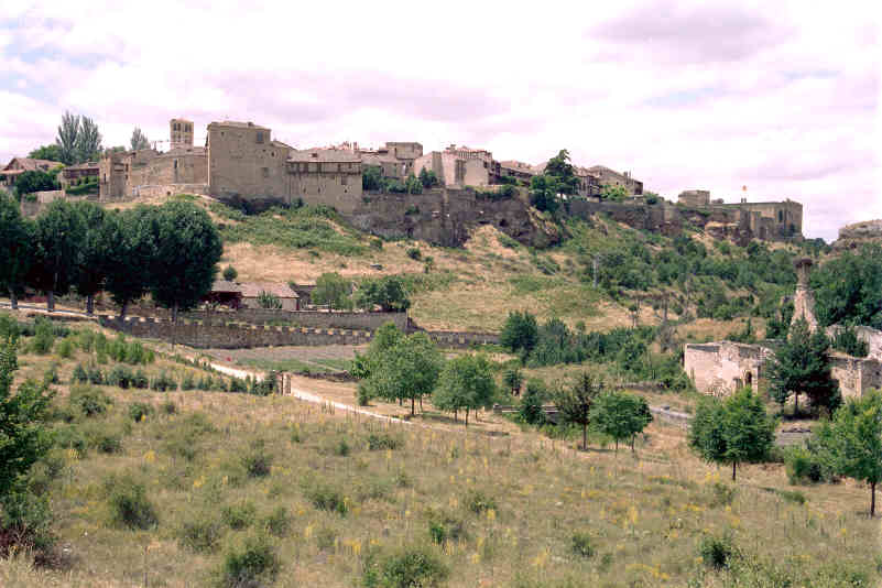 Vista de la villa amurallada de Pedraza en la provincia de Segovia (España). Tomada por --JMSE el 2 de julio de 2003 y cedida a Wikipedia.